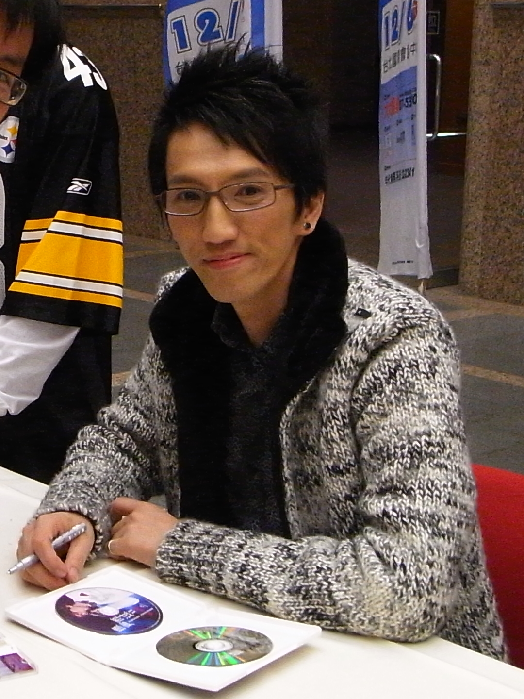 林志炫為其歌迷簽名。